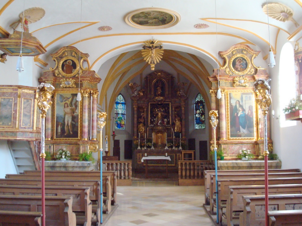 Gräfelfing, old Church St. Stephanus, interior